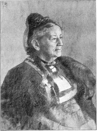 Maren Sars, født Welhaven, tegnet av Johan Sebastian Welhaven